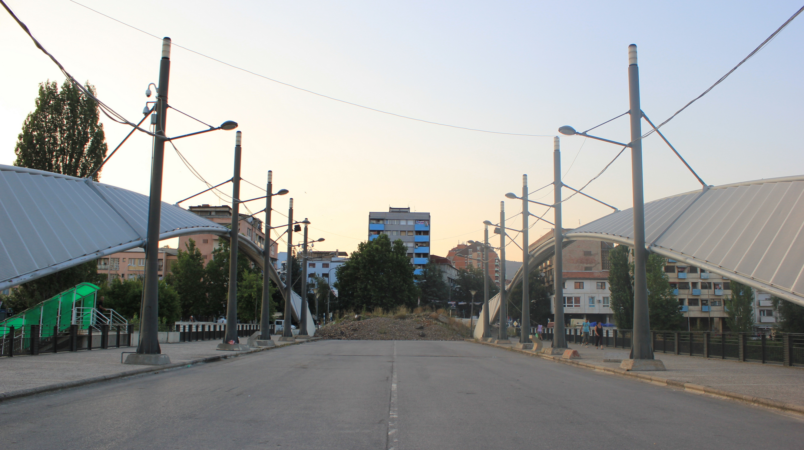 Die Brücke über den Ibar in Mitrovica verbindet den albanischen mit dem serbischen Teil der Stadt (Blick nach Norden).Hornjoserbsce: Móst nad Ibarom w Mitrovicy zwjazuje albanski dźěl města ze serbiskim.